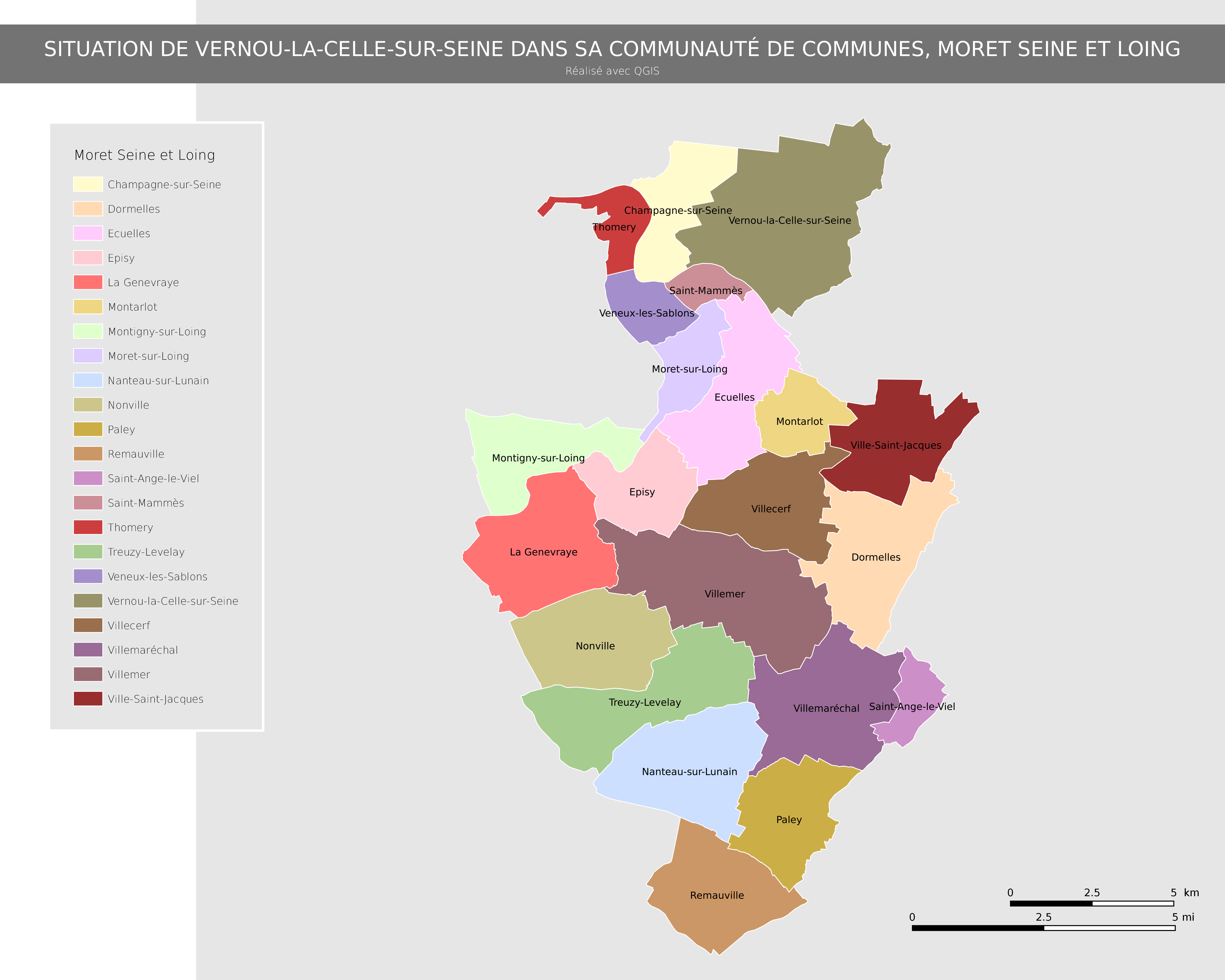 Vernou-la-Celle-surSeine dans sa Communauté de communes, Moret Seine et Loing